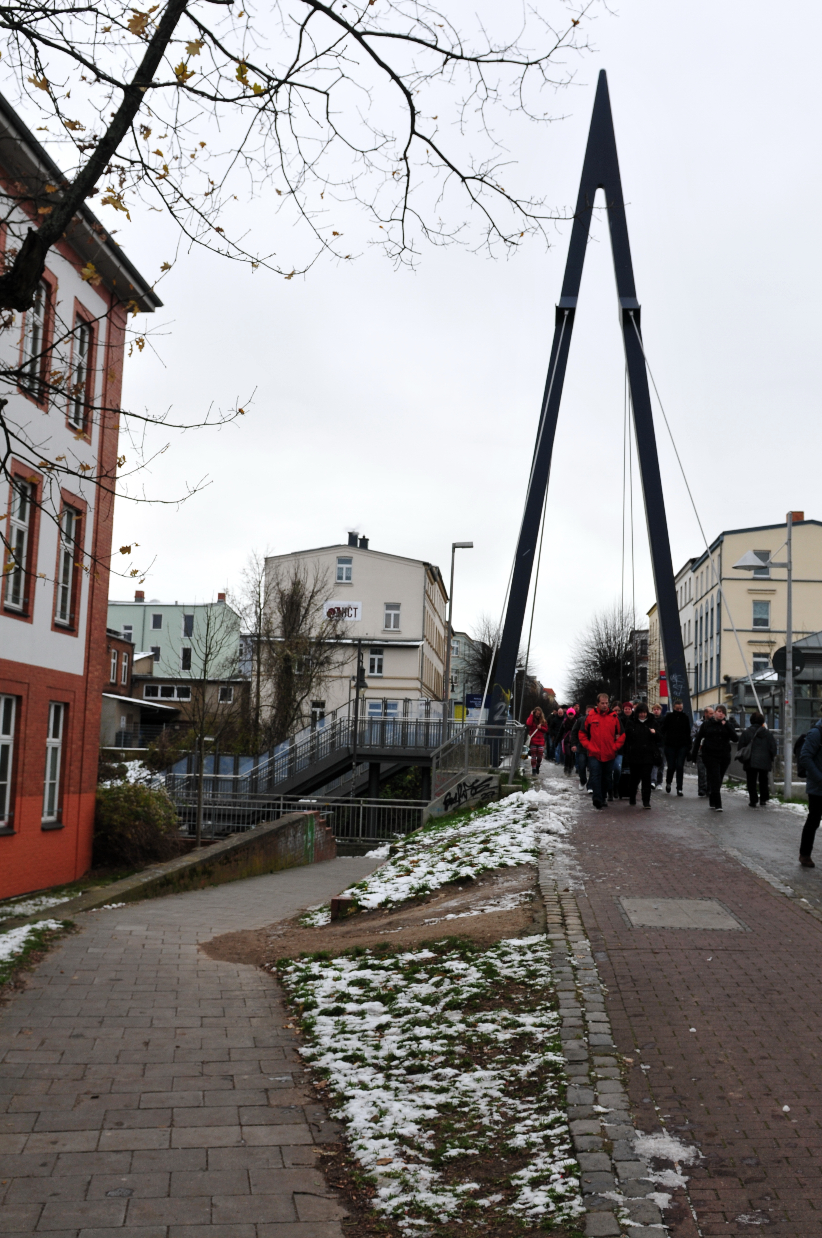 Schwerin. Blick vom Lobedanzgang zur Brücke über die Bahnschienen am Haltepunkt Schwerin-Mitte. Dahinter liegt die Von-Thünen-Straße. Menschen überqueren die Brücke. Ein typisches Bild im Pendlerverkehr.